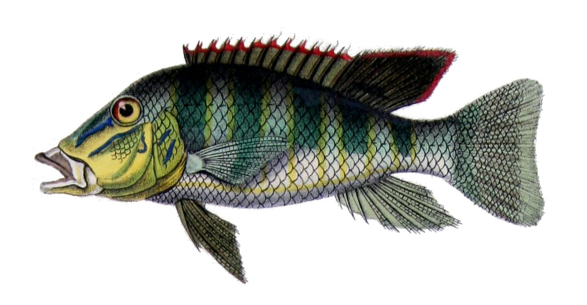 Chromys lapidifer Cast. = Retroculus lapidifer (Castelnau, 1855)